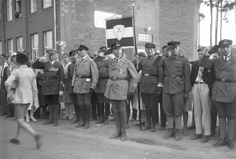 H.O. Sieveking, der Reichsführer der deutschen Bismarck-Jugend, an einer Blutvergiftung gestorben! Der Führer der Bismarckjugend H.O. Sieveking vor der Standarte, nimmt den Vorbeimarsch einer Abteilung Bismarckjugend ab.